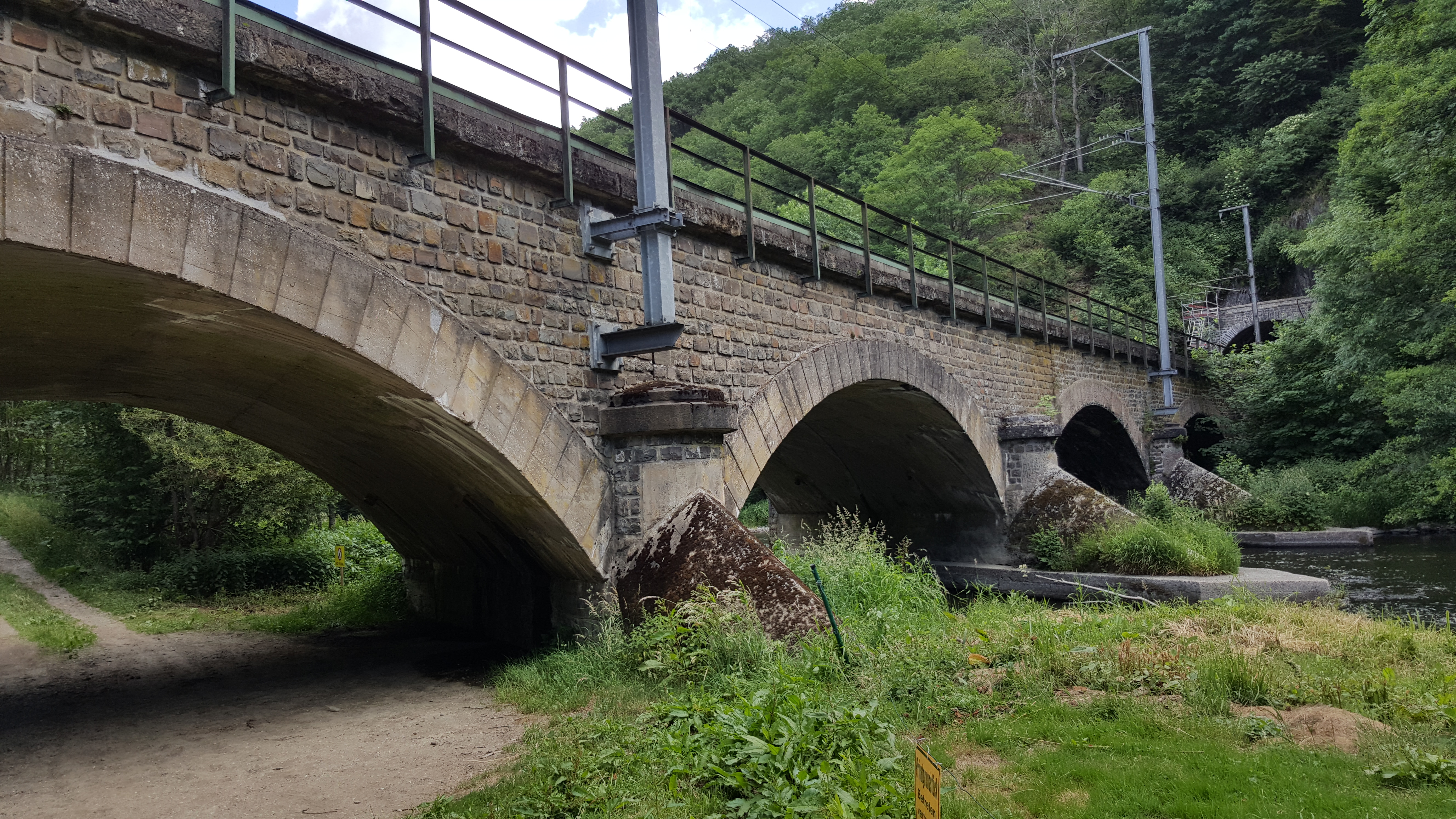 Eisebunnsbréck iwwer d'Sauer op der Giewelsmillen am Juni 2017